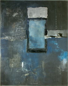 Nocturnal emmision, Öl-Eitempera, Teer, Kreide auf Leinwand, 275x235cm, 1982